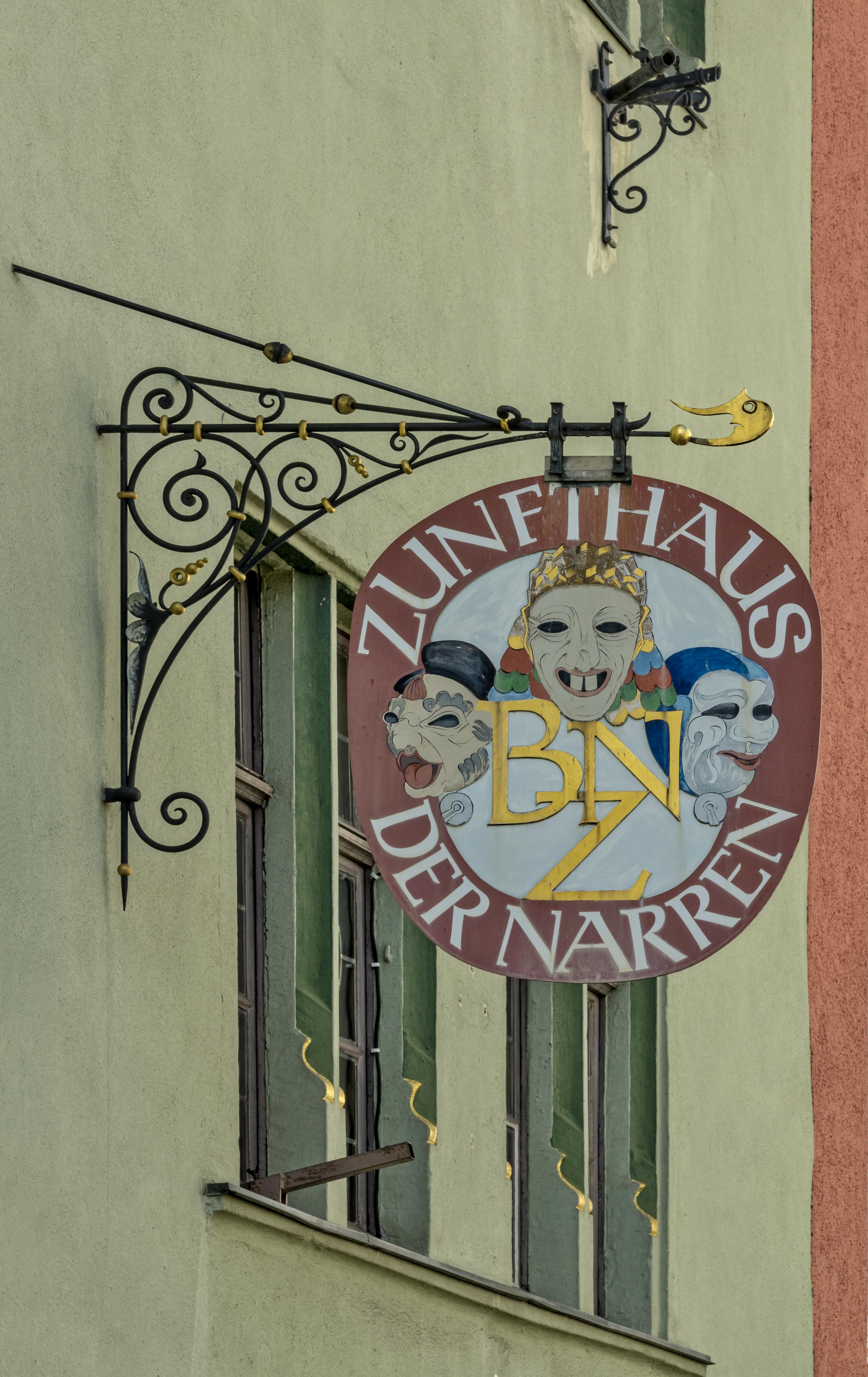 Bilder aus Freiburg Freiburg Zunfthaus der Narren